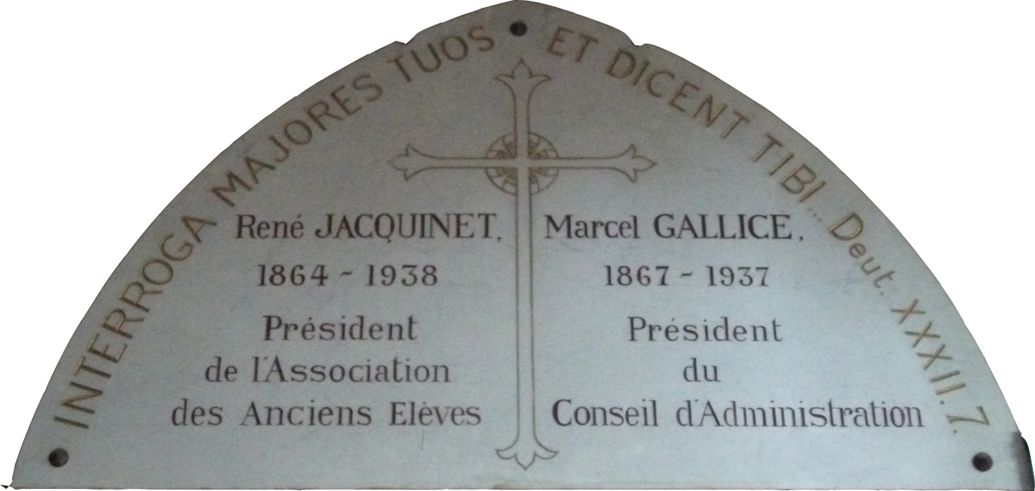 plaque rendant homage à René Jacquinet et Marcel Gallice, elle se situe dans la chapelle saint joseph de Reims, rue de Venise.